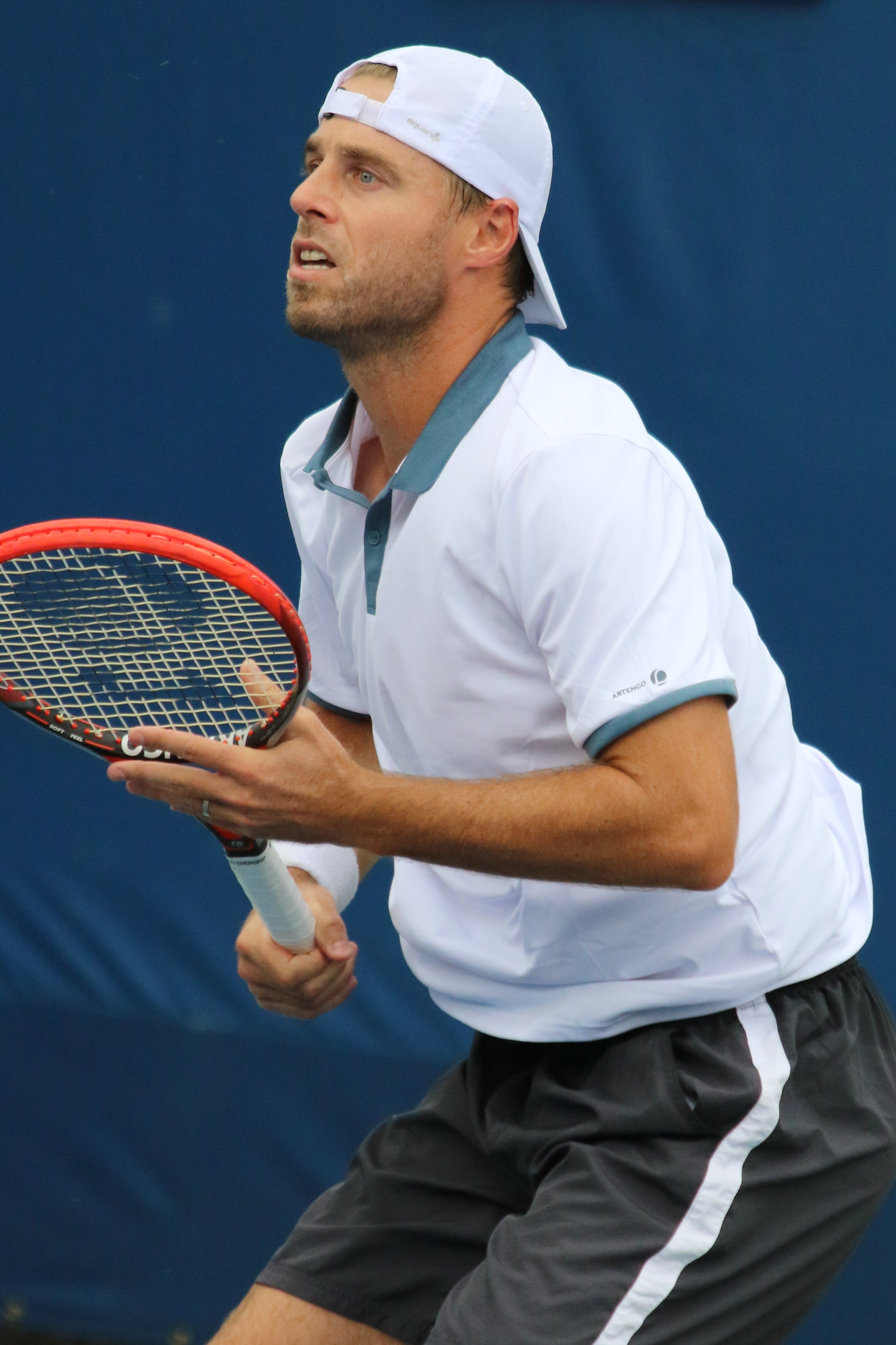 Marach US16 (1)